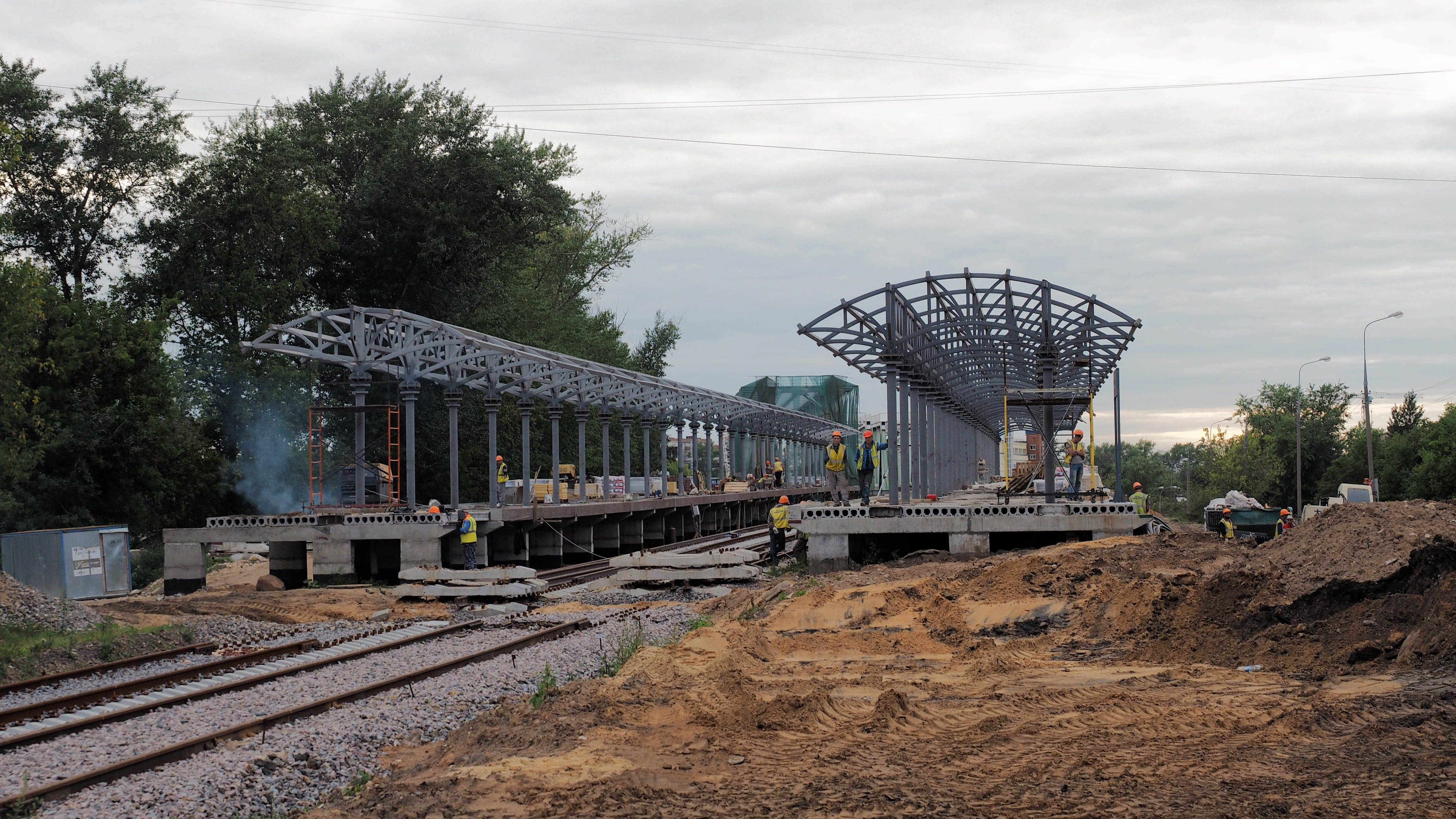 Строительство платформы Гостиничная МКЖД